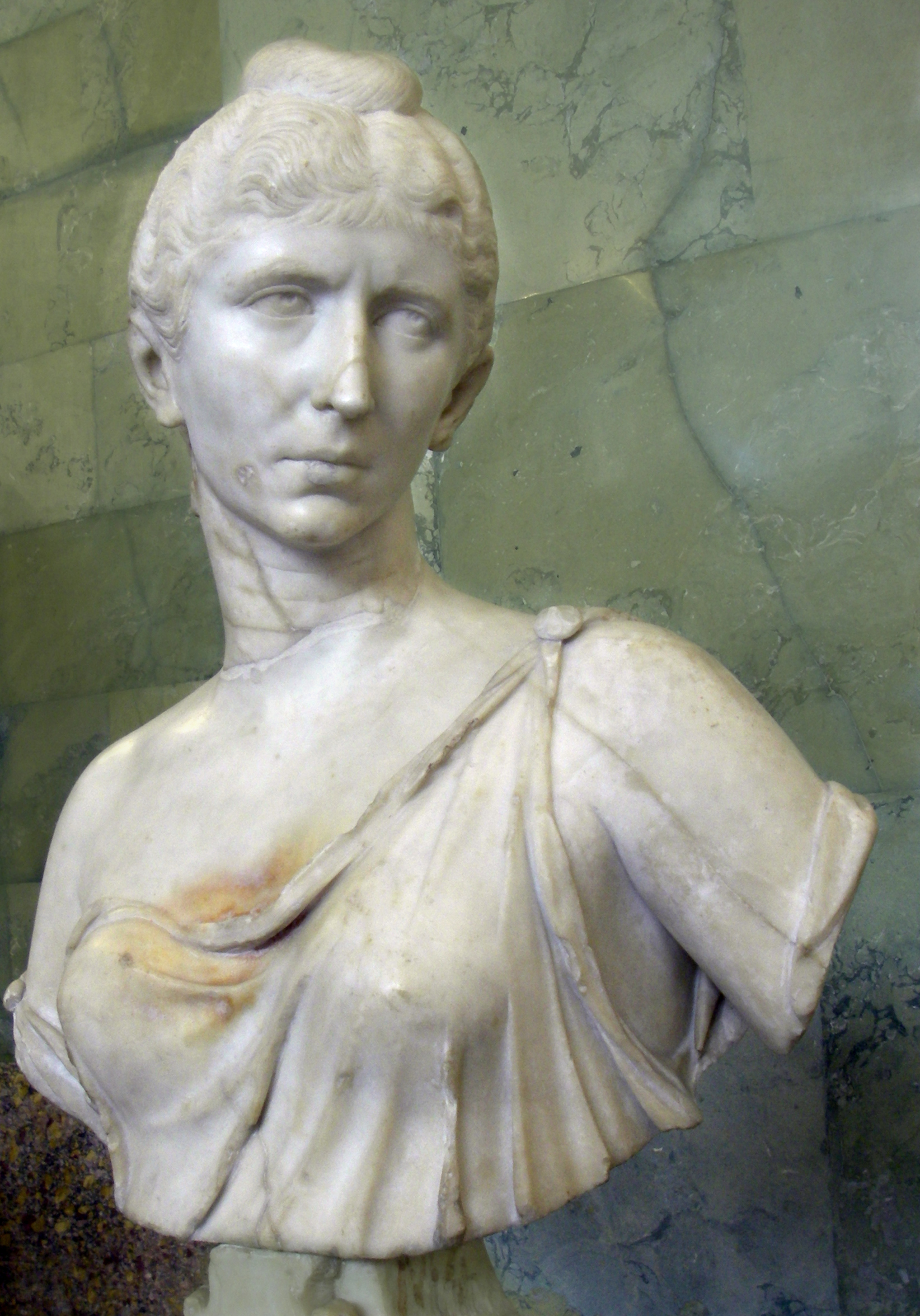 Портрет Корнелии Салонины, жены имератора Галлиена. Около середины III в. Мрамор, А 29. Эрмитаж, зал Юпитера. Санкт-Петербург, Россия.